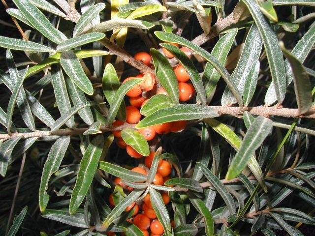 Hippophaë rhamnoides